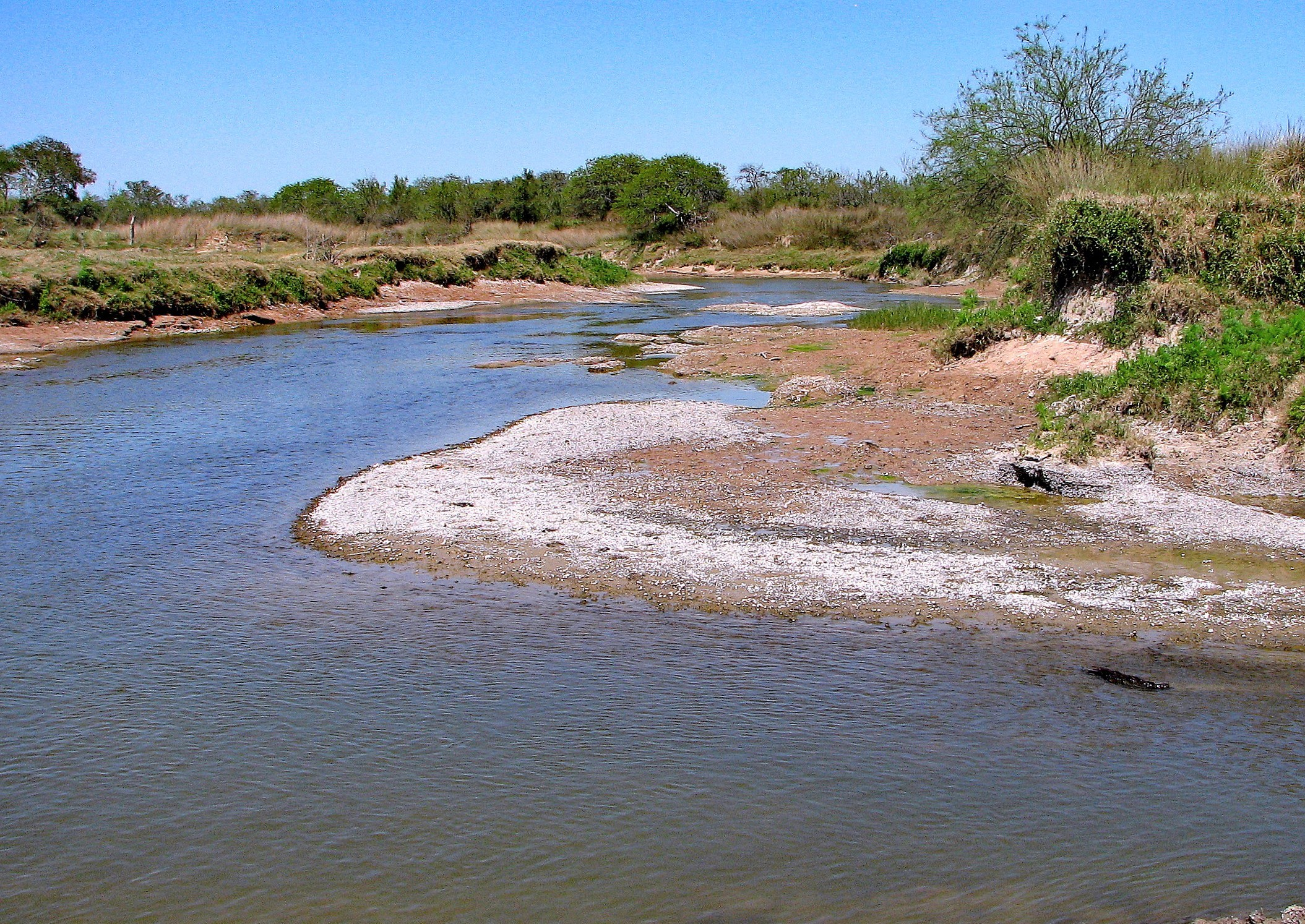 Descripción paisajística de la zona rural de Progreso (Santa Fe)